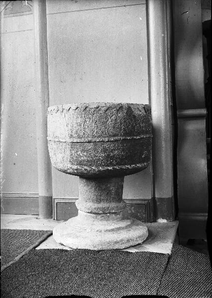 Dopfunt av täljsten. 1200-talets senare del. Kategori: (04) DopfuntarDopfunt av täljsten. 1200-talets senare del.